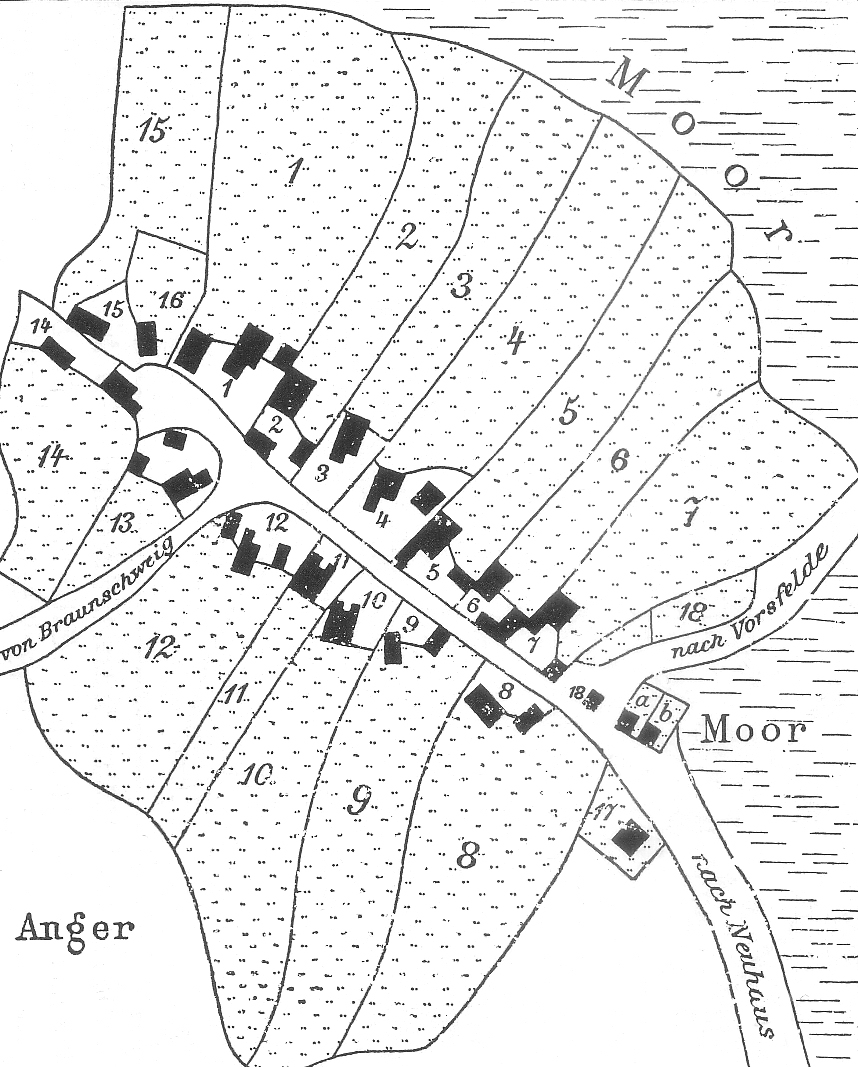 Grundstücksplan von Reislingen von 1758. Die Nr. sind: 1-5 und 12-14 Ackerhöfe, 6-11 und 15-16 Kothhöfe, 17 Schule, 18 Hirtenhaus, a-b neue Anbauer